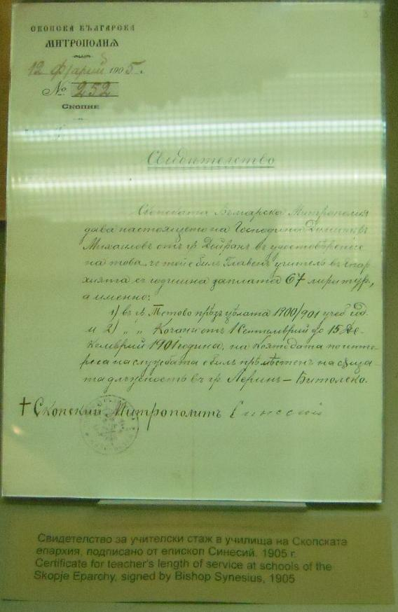 Писмо на митрополит Синесий Скопски. Експонат на Националния исторически музей, София.